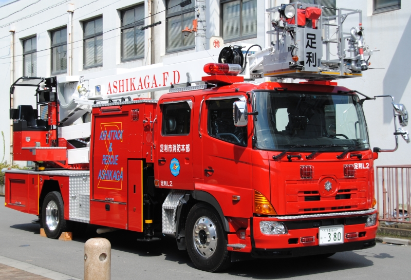 足利市消防本部のはしご車